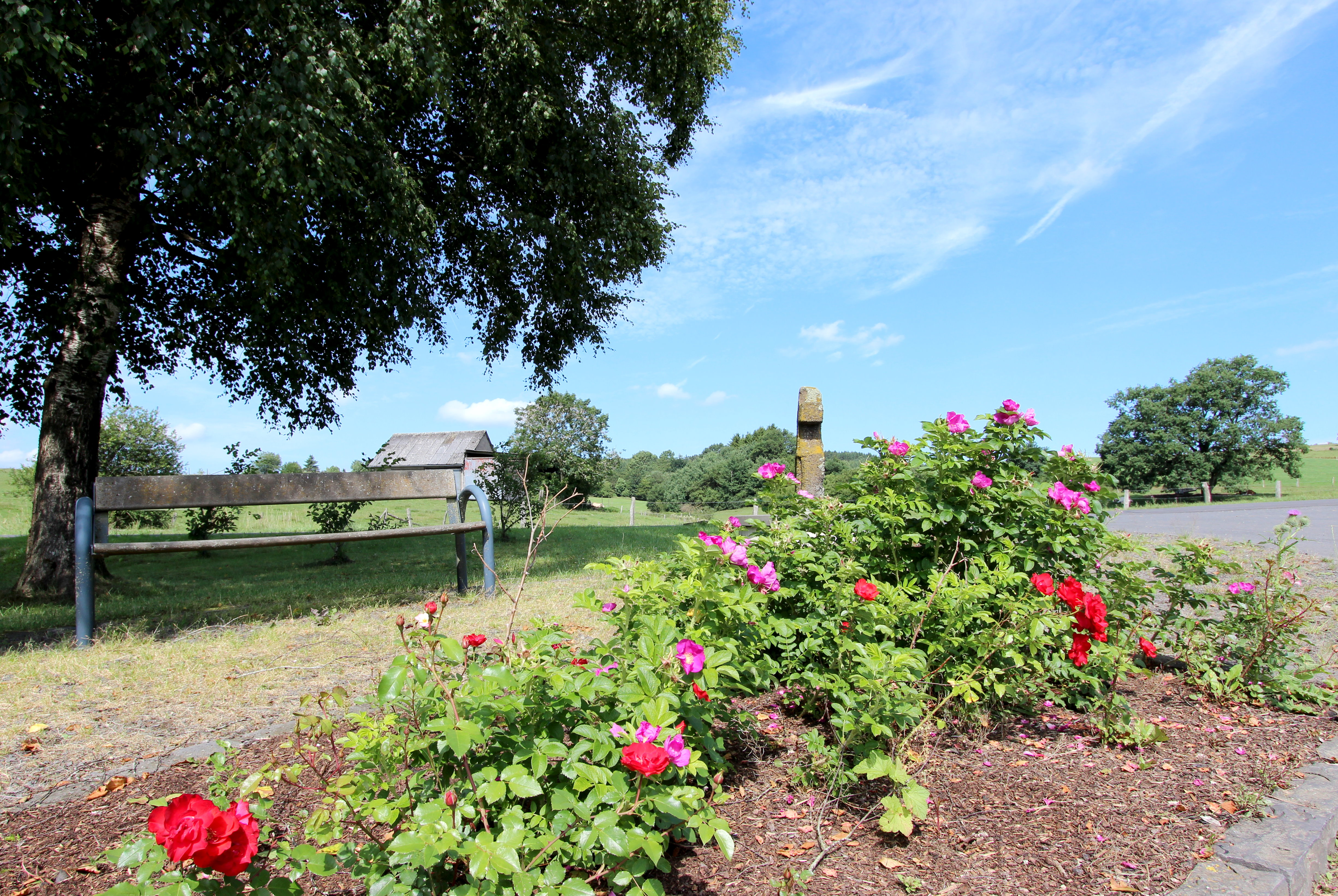 54597 Reuth. Hinter dem Ortsausgang in Richtung Neuendorf. Aufnahme von 2017.